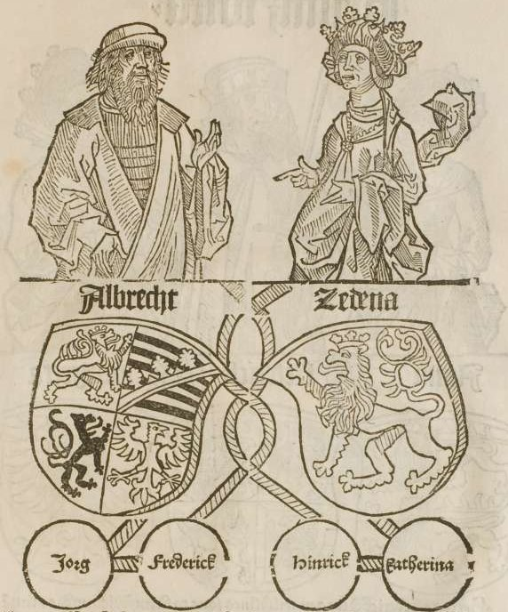 Titelvignette, Holzschnitt aus: Conrad Bote, Cronecken der sassen, Mainz (Peter Schöffer) 1492